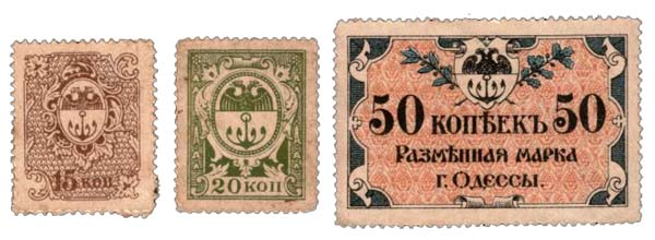 Одесские деньги-марки: 15, 20, 50 копеек, аверс. Односторонняя (?) 1917